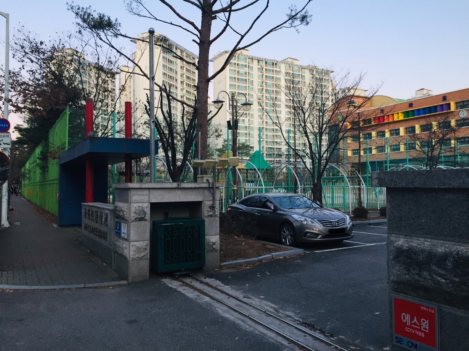 대한민국 경기도 고양시 가좌동 가좌초등학교 정문